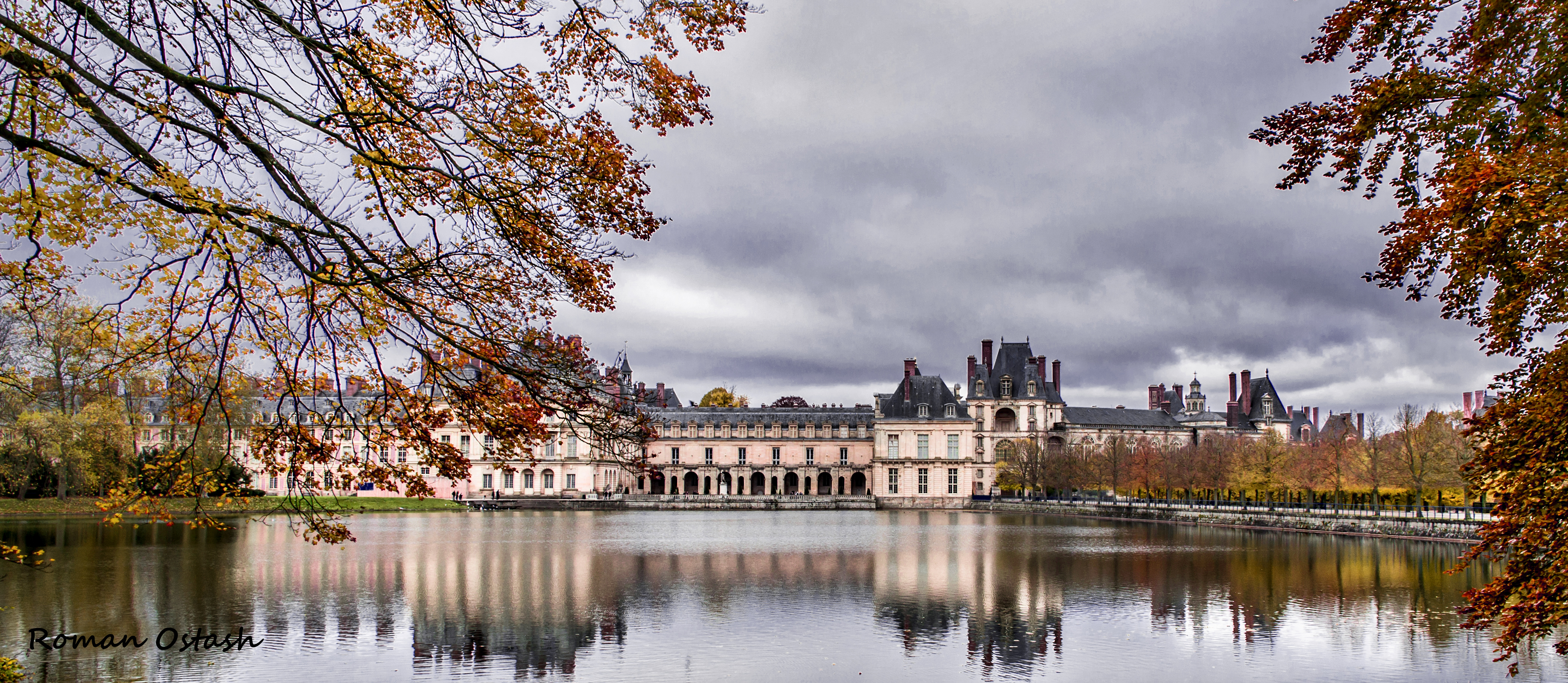 Château de Fontainebleau